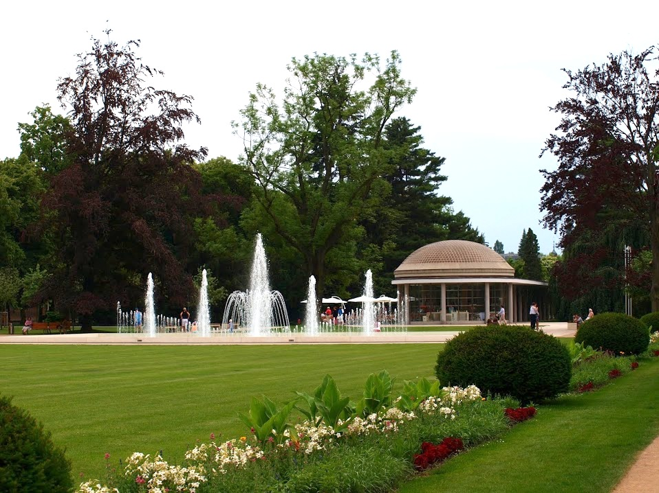 Poděbrady, lázeňský park a Libenského kolonáda